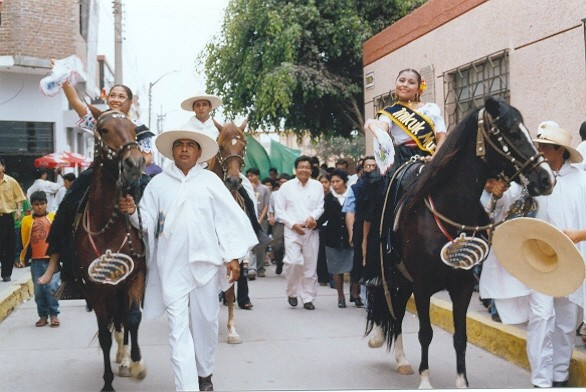 Desfile de las Señoritas Fexticum anunciando el inicio de la fiesta.